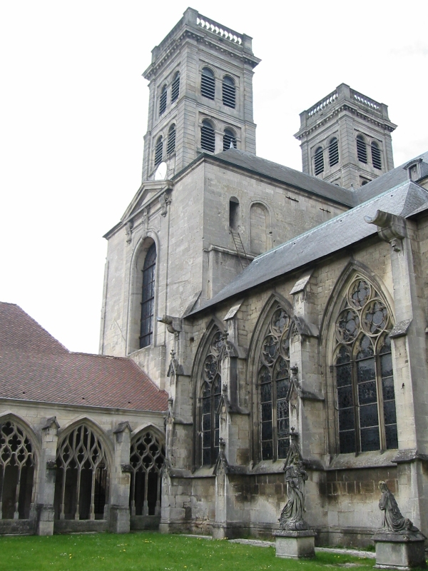 Vue de la cathédrale romane de Verdun depuis le cloître gothique flamboyant.